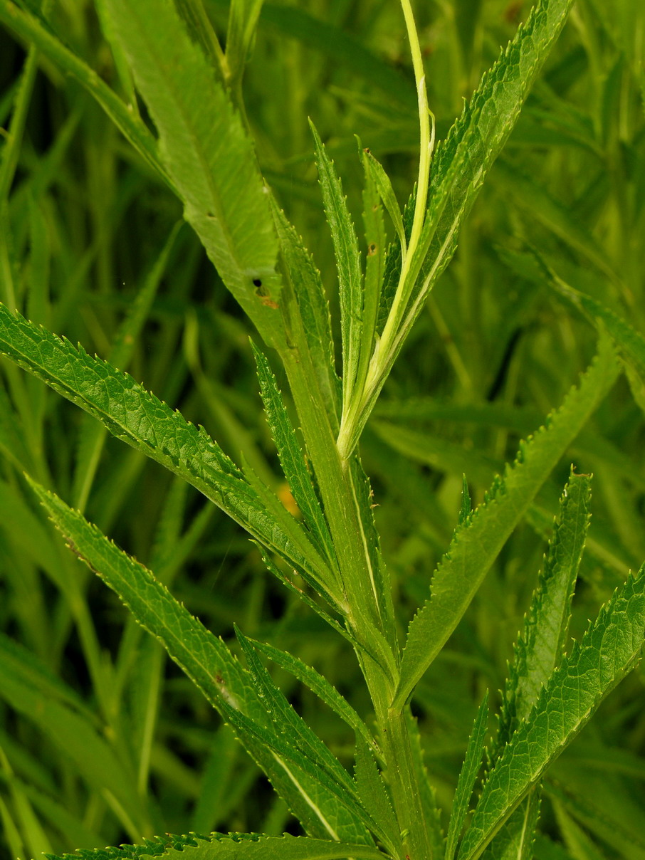 Pelkinė žilė (Senecio paludosus), lapai Šeima. Astriniai (Asteraceae) Foto: Algirdas, 2006 m. liepos 22 d., Lietuva